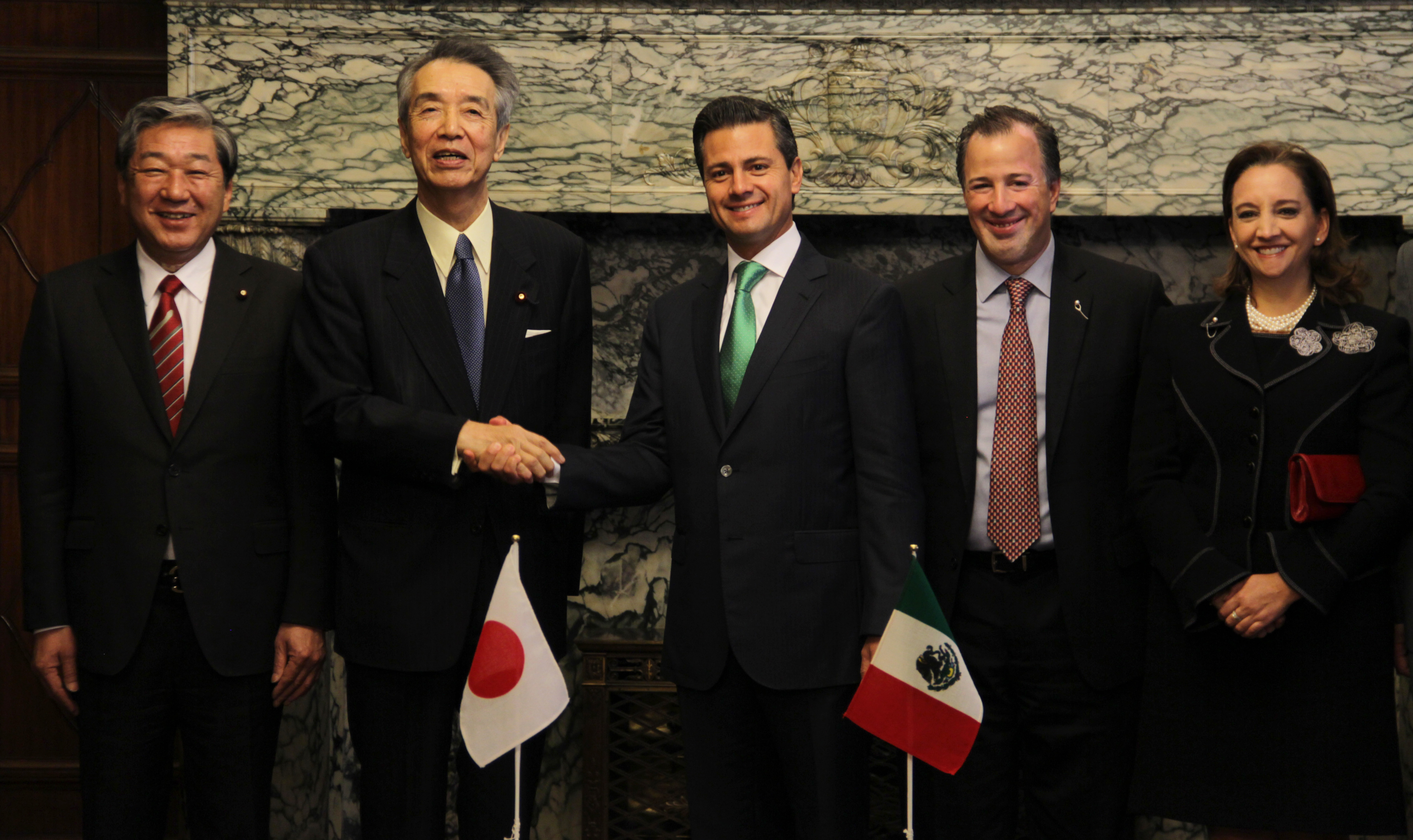 Reunión con el Diputado Bunmei Ibuki, Presidente de la Cámara de Representantes de Japón. Tokyo, Japón. 9 de abril de 2013.